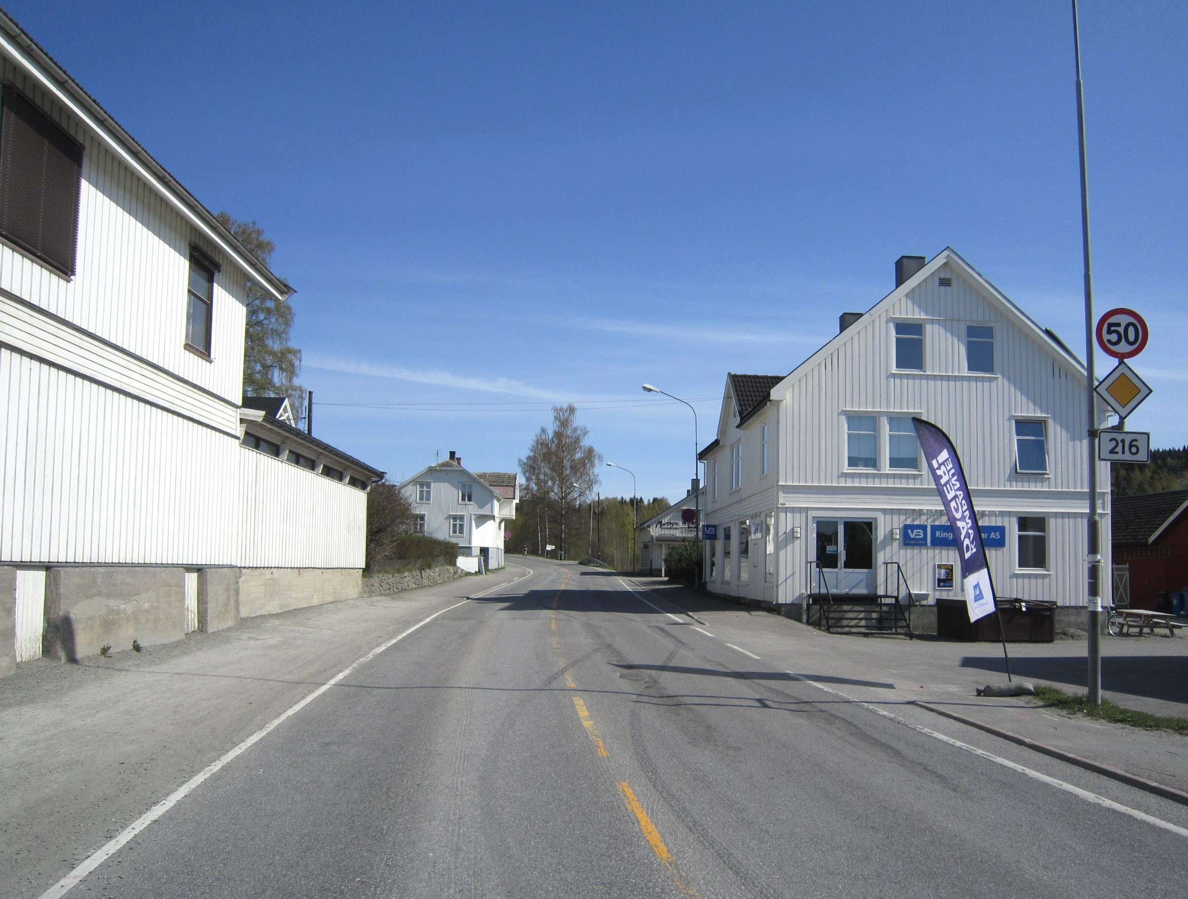 Åsmarkvegen (fylkesvei 216) på vei ut av Moelv